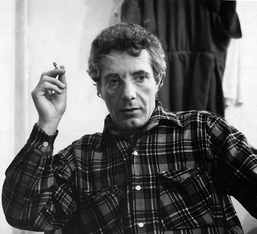 Gianrico Tedeschi